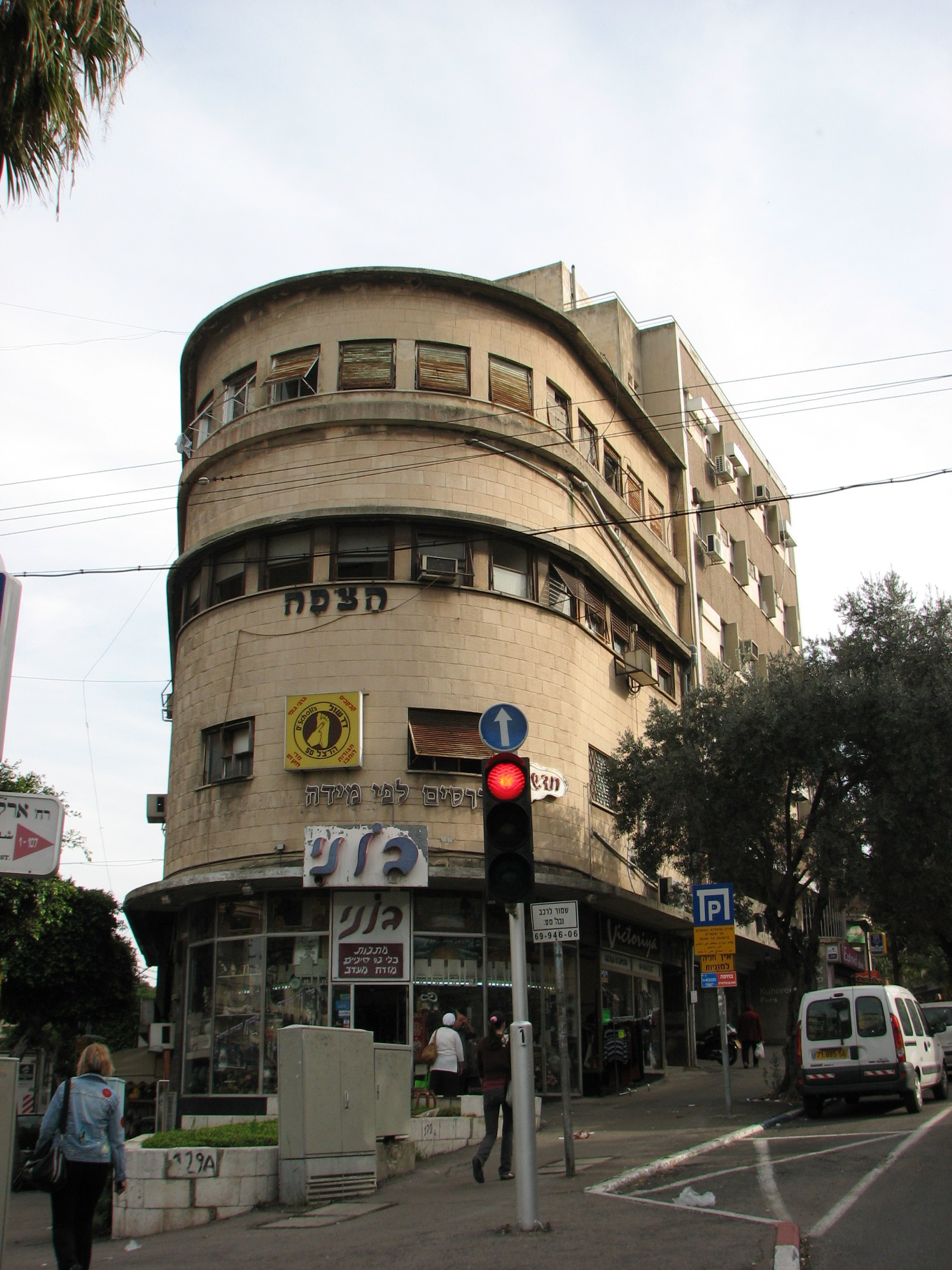 "בית שכנא רובינשטיין" תוכנן על ידי האדריכל he:בנימין אוראל בפינת הרחובות הרצל וארלוזורוב בhe:חיפה ונבנה בשנת 1939 כבית קפה, חנויות ומשרדים. הקומה העליונה הוקמה בשנת 1946, ולאחר מכן התמקמה בקומה זו מערכת עיתון הצופה.